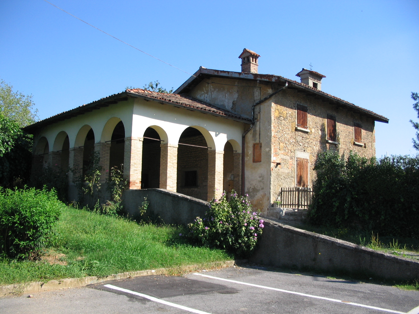 Chiesa dei Santi Siro e Sinigoldo, chiesa romanica in Capriate San Gervasio